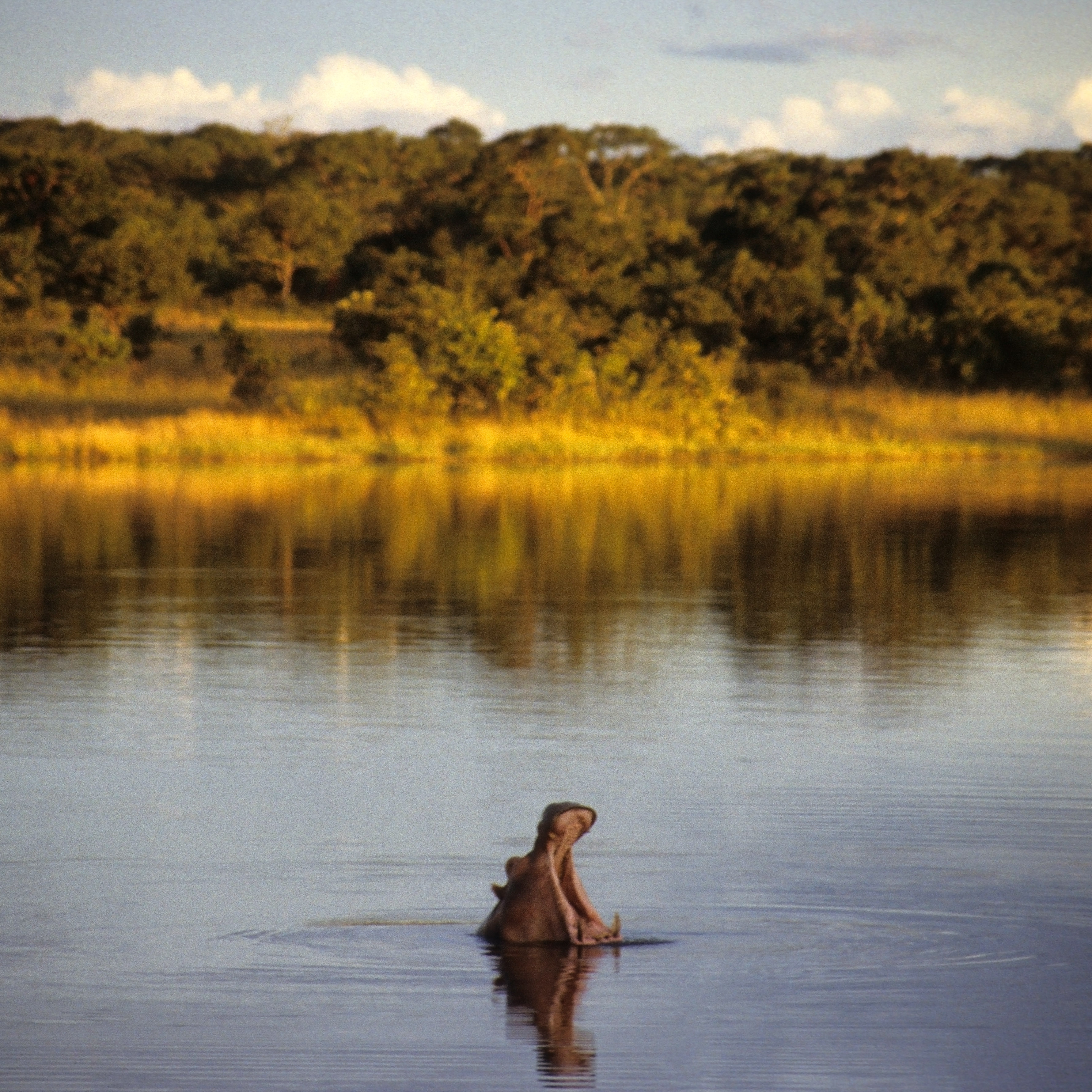 Yawning Hippo in Kasungu National Park